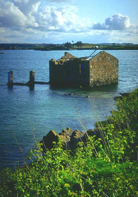 Moulin à marée de Bréhat avant restauration Bretagne - France